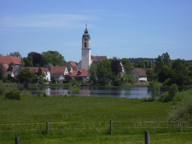 Ortsansicht von Kißlegg mit Pfarrkirche und dem Zellersee (Wasserfläche und Uferzone im Naturschutzgebiet „Zeller See“)